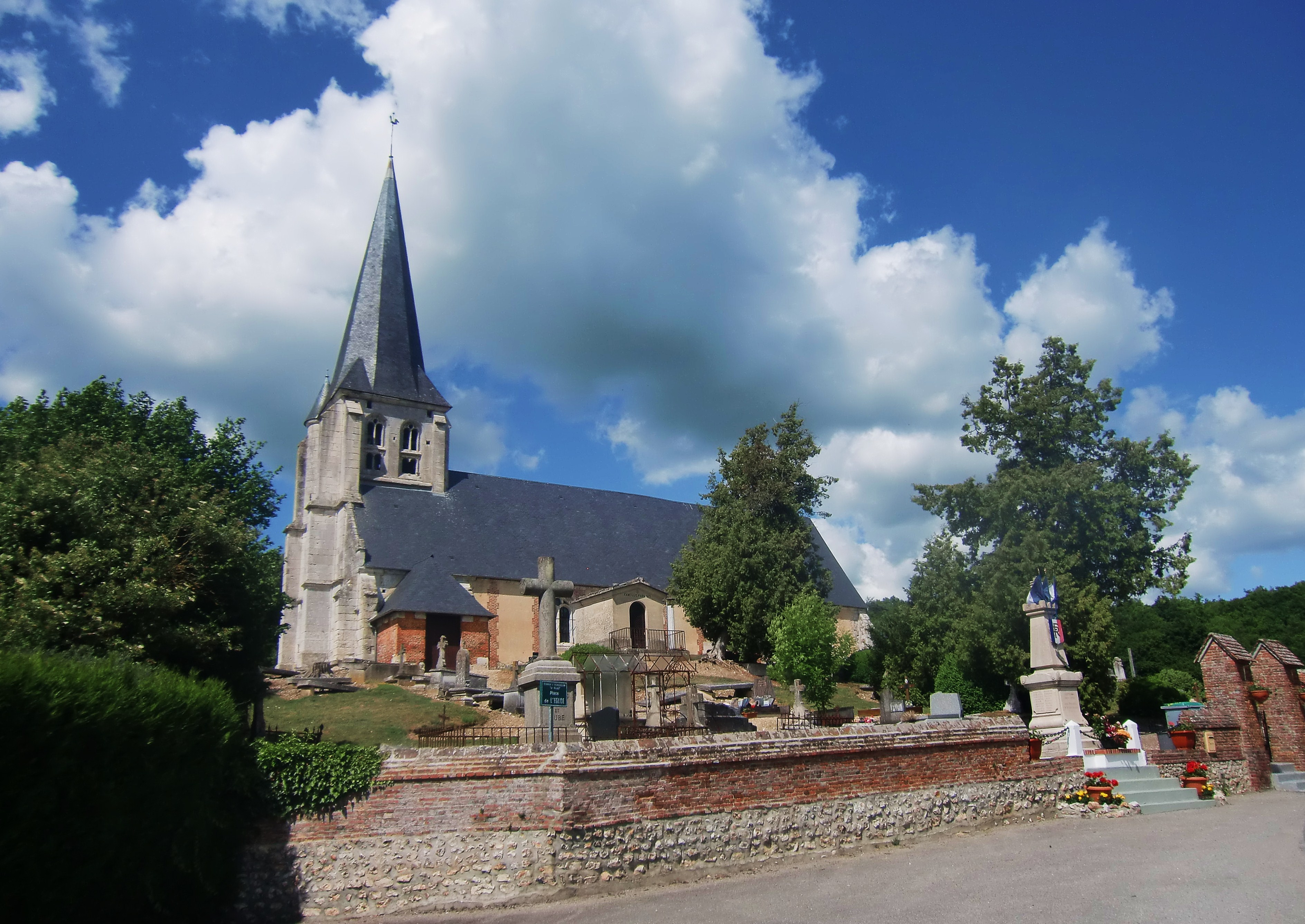 Eglise paroissiale d'Écaquelon (Eure, Normandie, France)